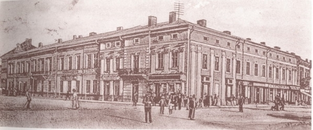 Готель Пунтшерта, Тернопіль